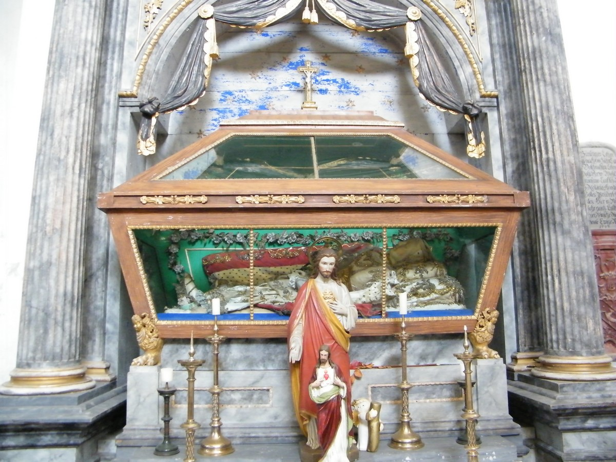 Oltář svaté Gaudencie v kostele svatého Mikuláše v Mikulášovicích